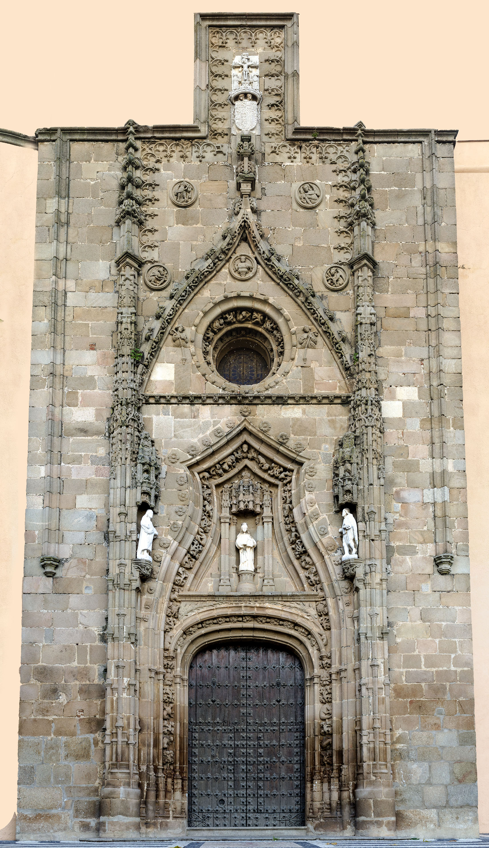 Portada de estilo gótico tardío datada alrededor de 1574